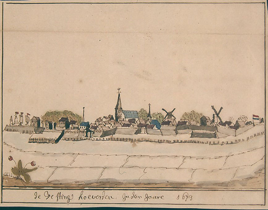 Beschrijving van het Landschap Drente, met Afbeeldingen der voornaamste Huizen